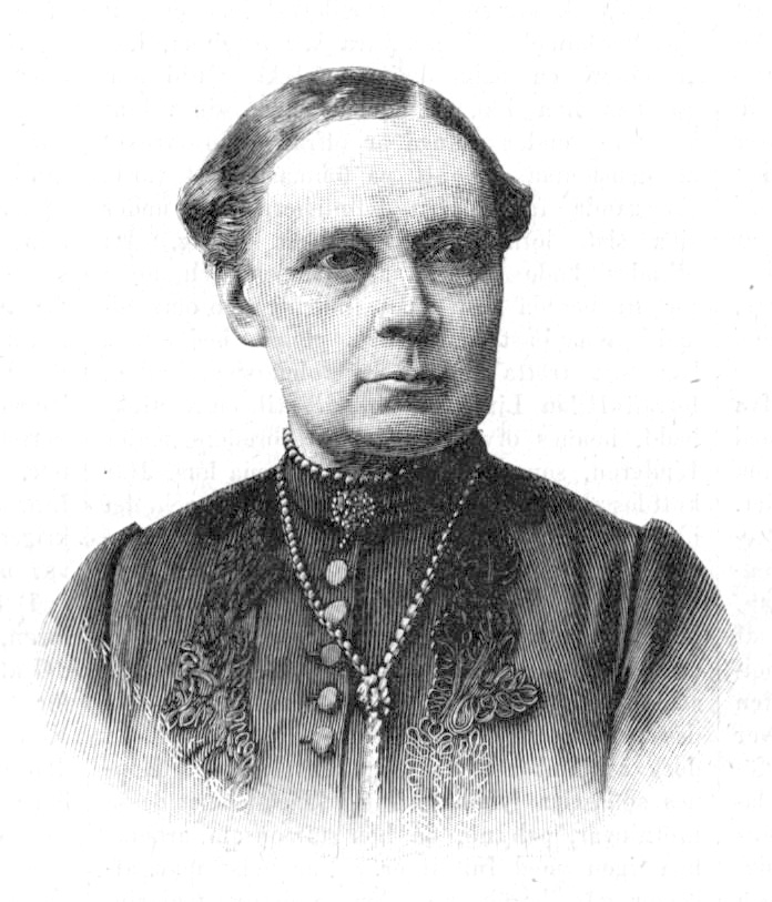 Hilda Lindgren (1833-1917)